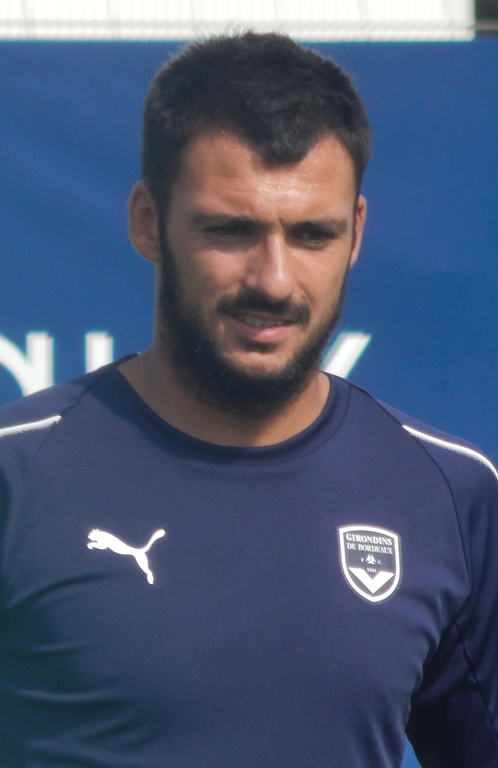 Gaëtan Laborde à l'entraînement avec les Girondins de Bordeaux le 19 juillet 2018.